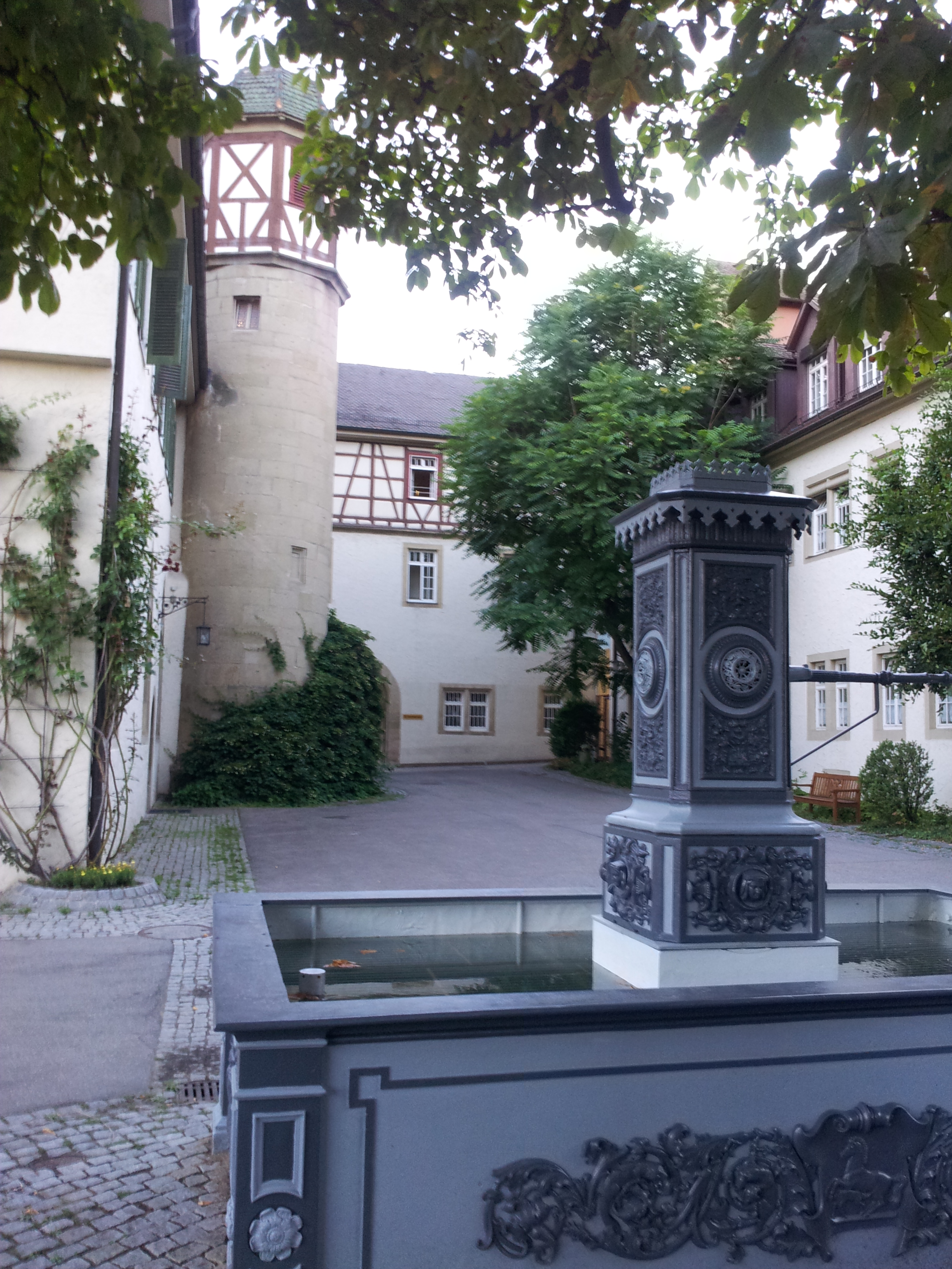 Brunnen im Innenhof vom Schloss Stetten.